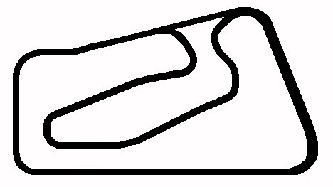 Botniaring map, Jurva, Finland